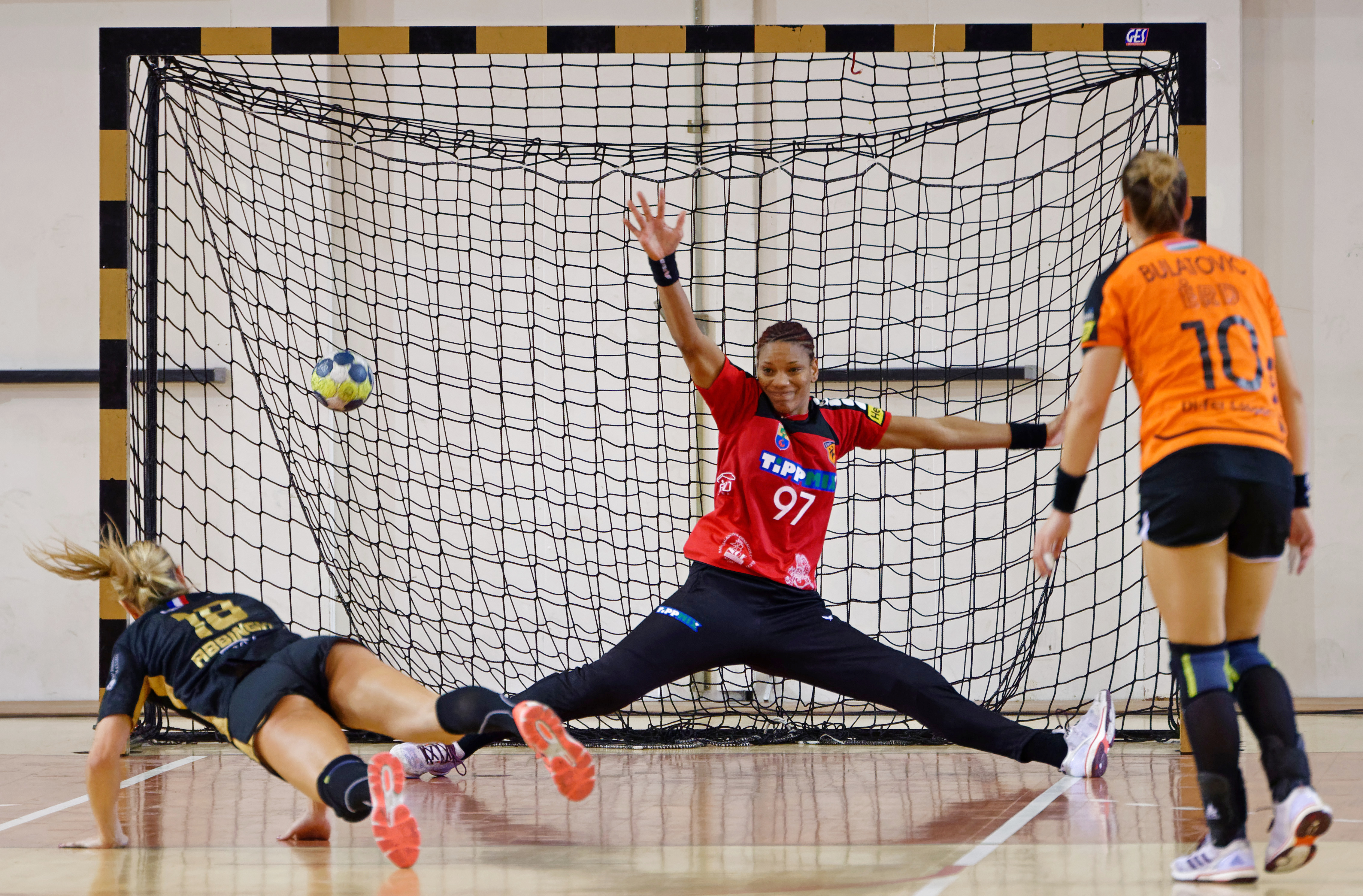 Rencontre retour du 3e tour de la coupe EHF, Issy Paris Hand / Erd. A Issy Les Moulineaux, le 18 novembre 2017.